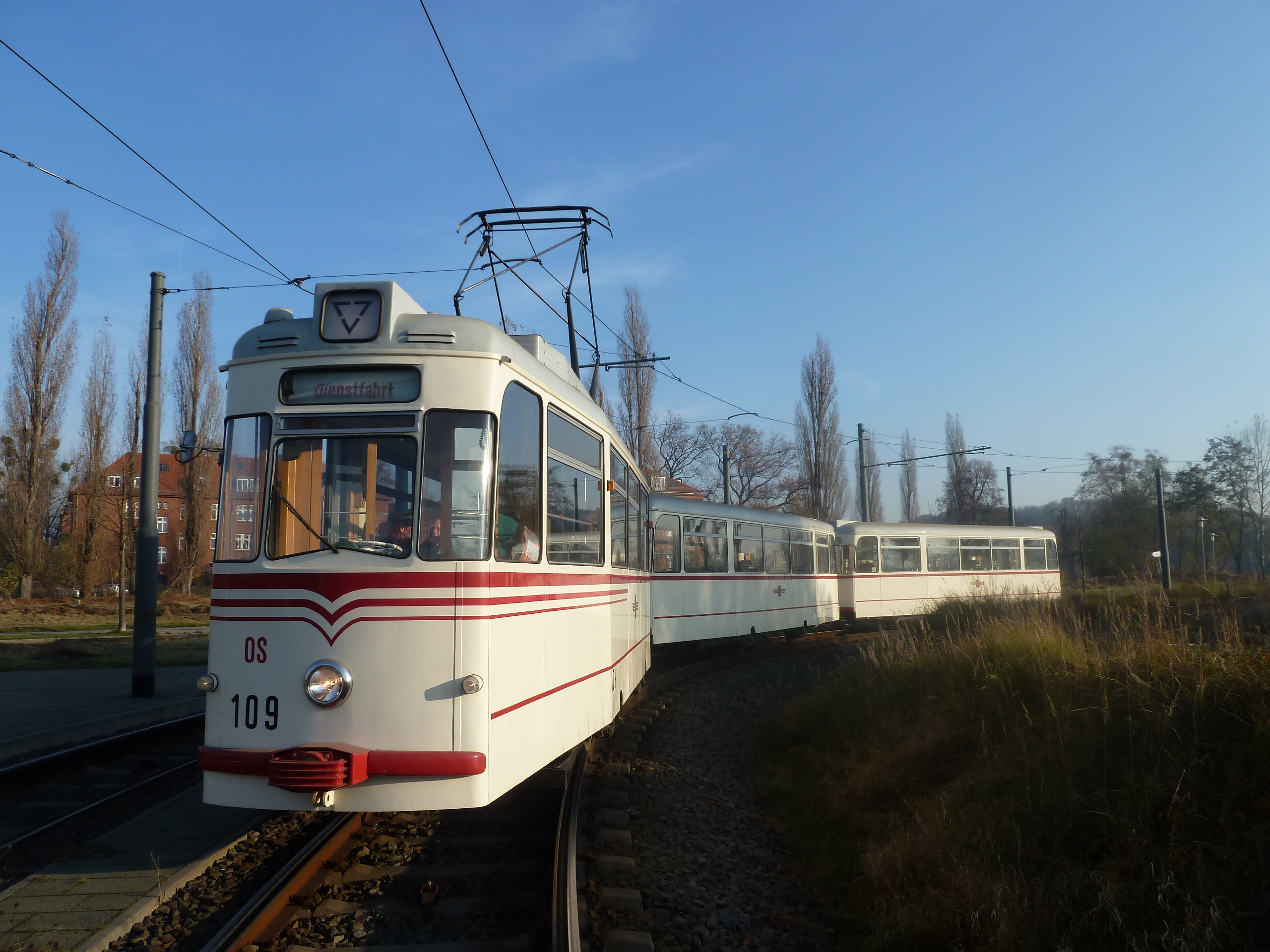 Gotha Straßenbahn in Potsdam, Gotha-Einheits-Triebwagen T2-62 Baujahr 1965, und Gotha-Einheits-Beiwagen B2-62 Baujahr 1965 und 1969